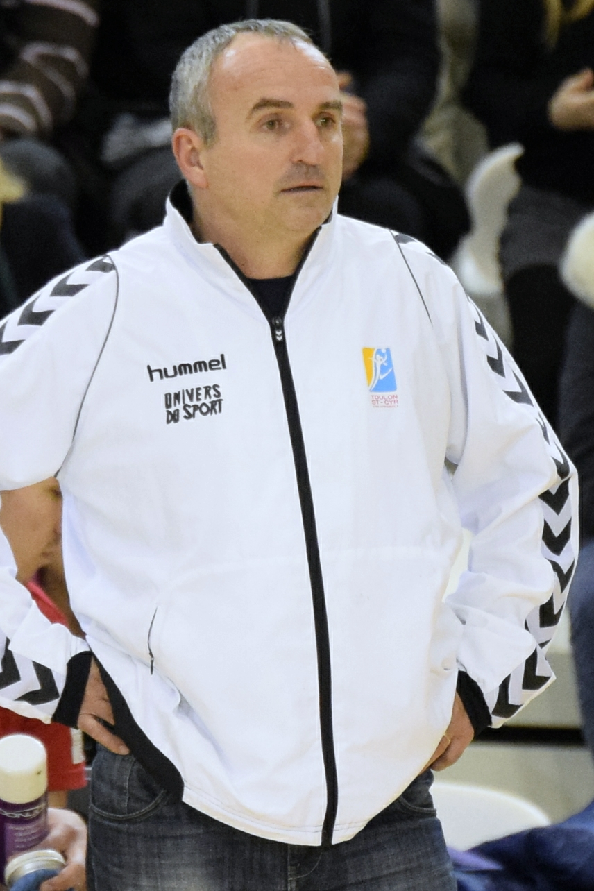 Thierry Vincent, entraîneur de handball du club Toulon St-Cyr Var Handball. Le 25 janvier 2015, lors du match de la 12e journée du championnat de France, face à Issy Paris Hand.